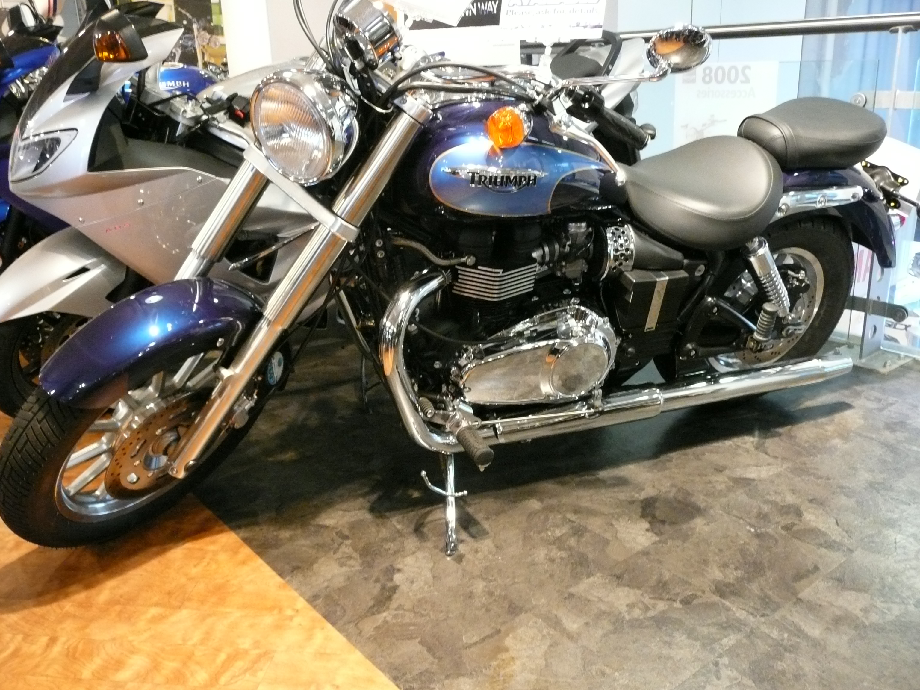 Triumph America (2008)